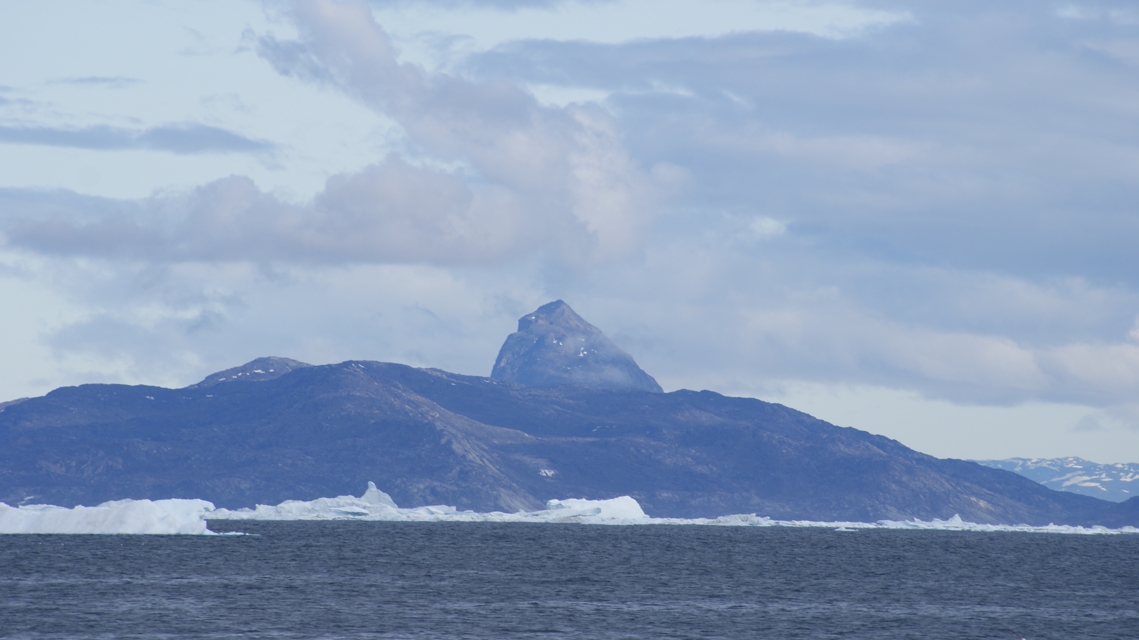 Ikerasak island seen from Uummannaq.